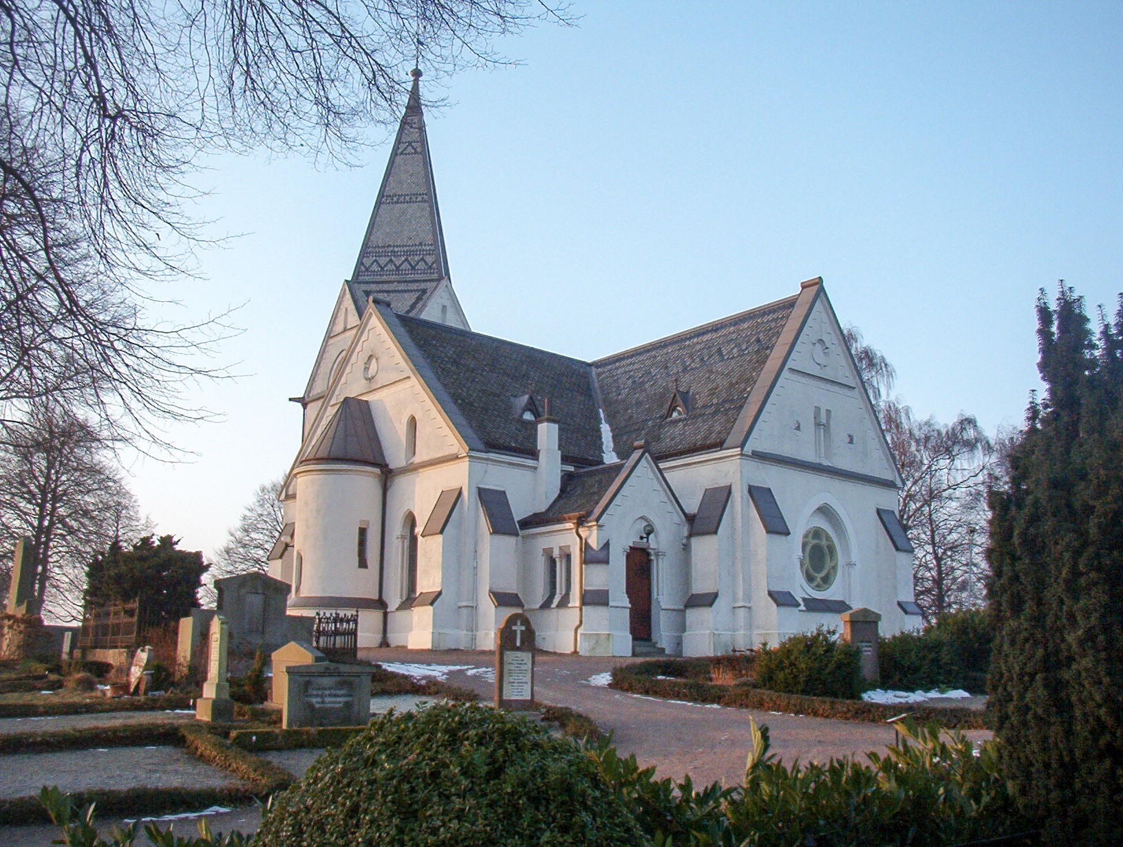 Fosie kyrka, Malmö, Sweden Date: January 2006